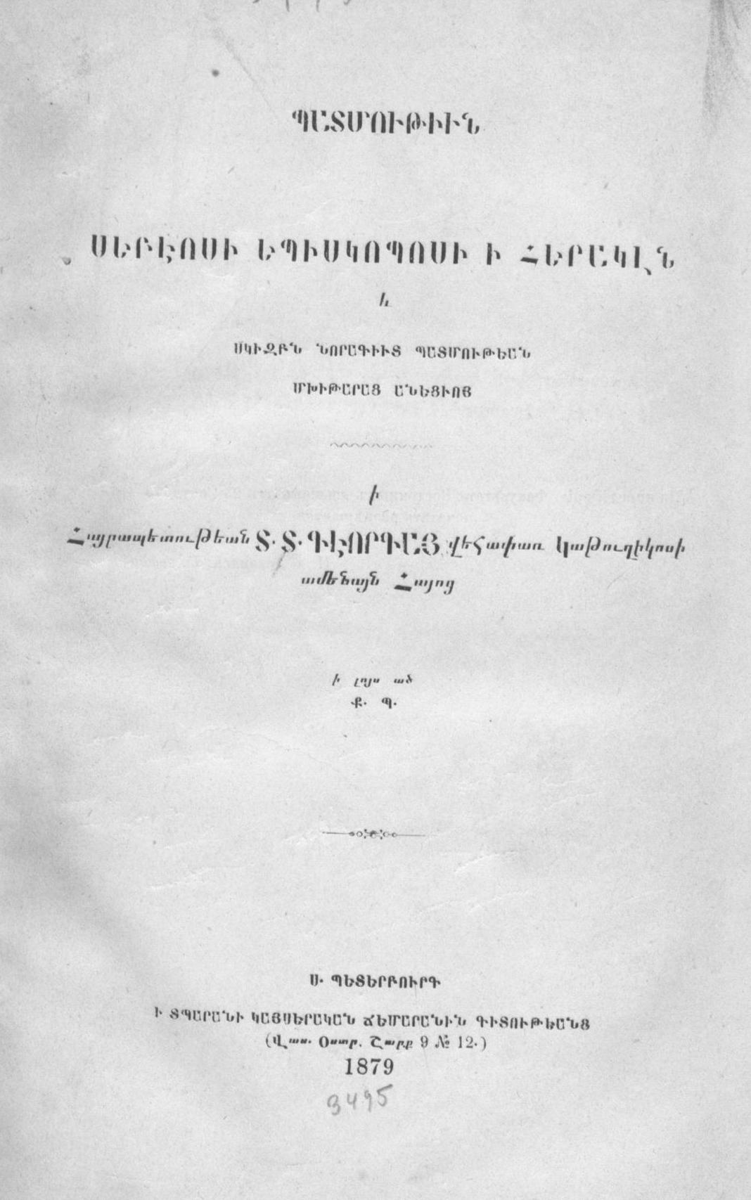 Страница издания «Истории императора Иракла» армянского историка VII века Себеоса